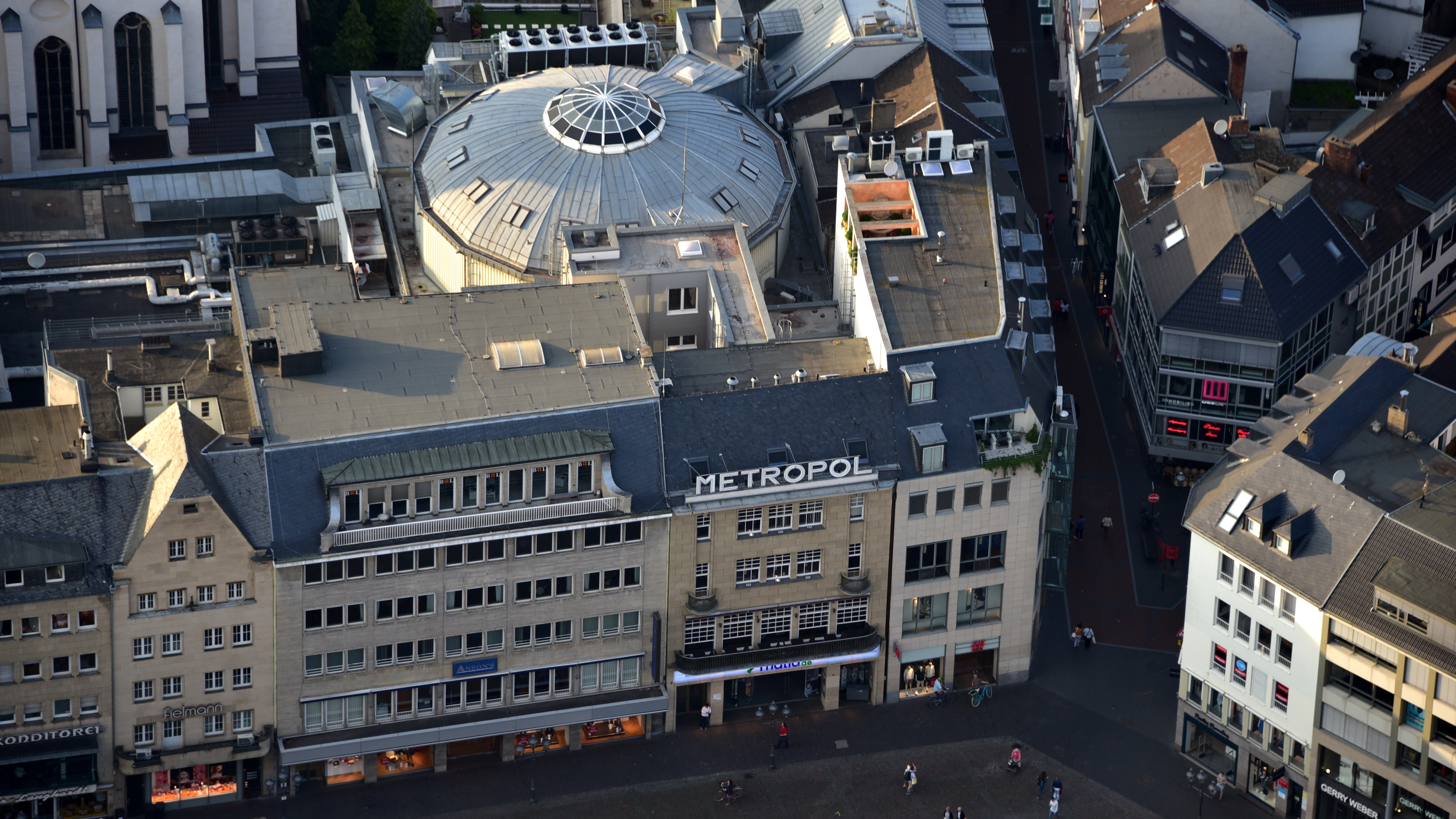 Metropol, Markt 24, Bonn: Luftaufnahme (2016)